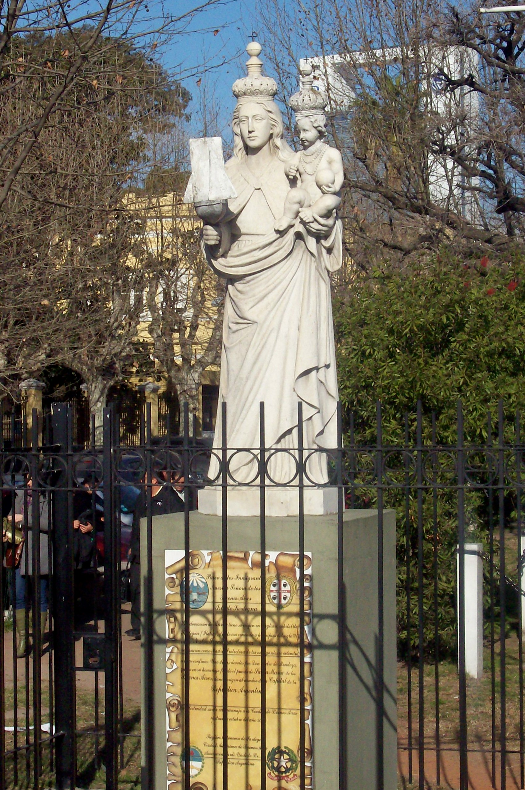 Nuestra Señora del Buen Aire, escultura donada por la Federación Sarda Argentina en la plaza Cerdeña, frente a la Dirección Nacional de Inmigraciones (Av. Antártida Argentina 1355), Retiro, Buenos Aires, Argentina.